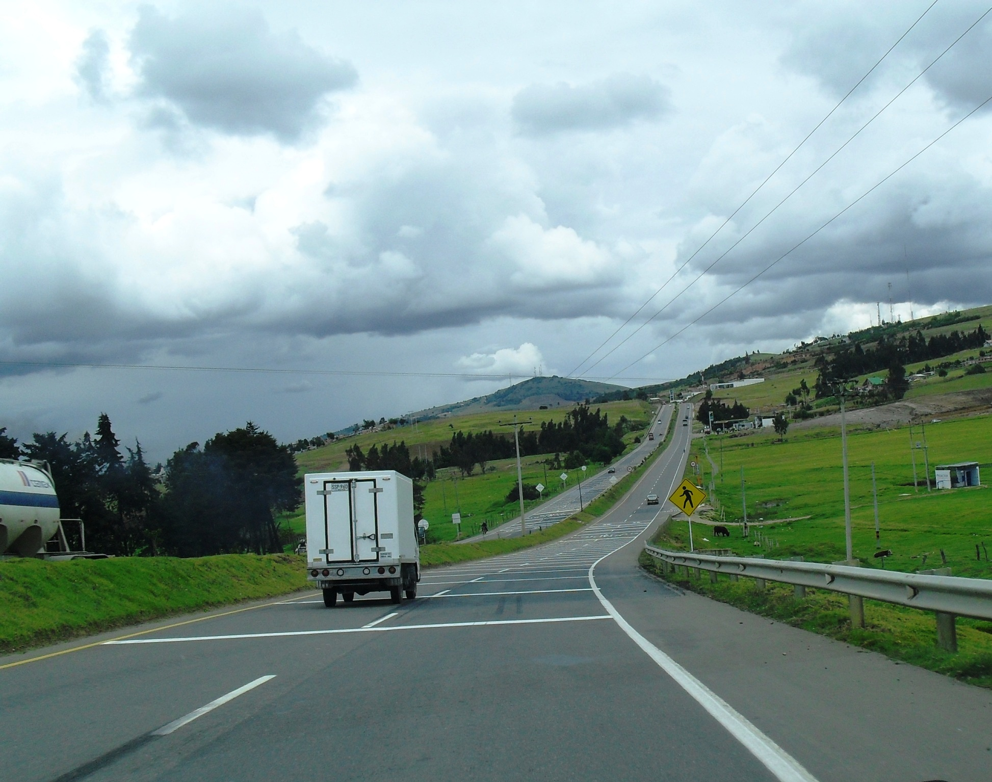 Doble calzada entre Briceno y Sogamoso, en inmediaciones de Tunja, Boyacá, Colombia